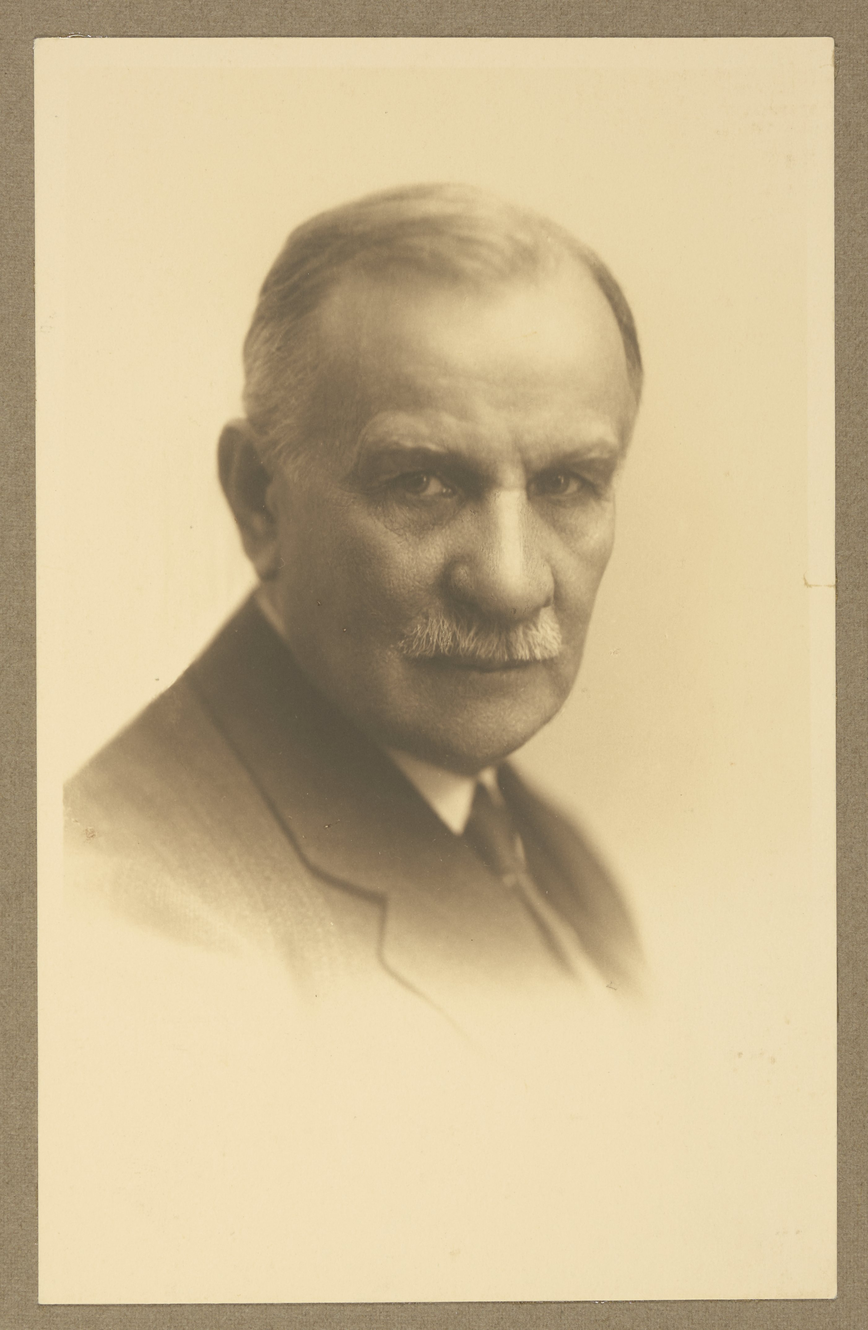 Józef Skąpski, ok. 1932 r.